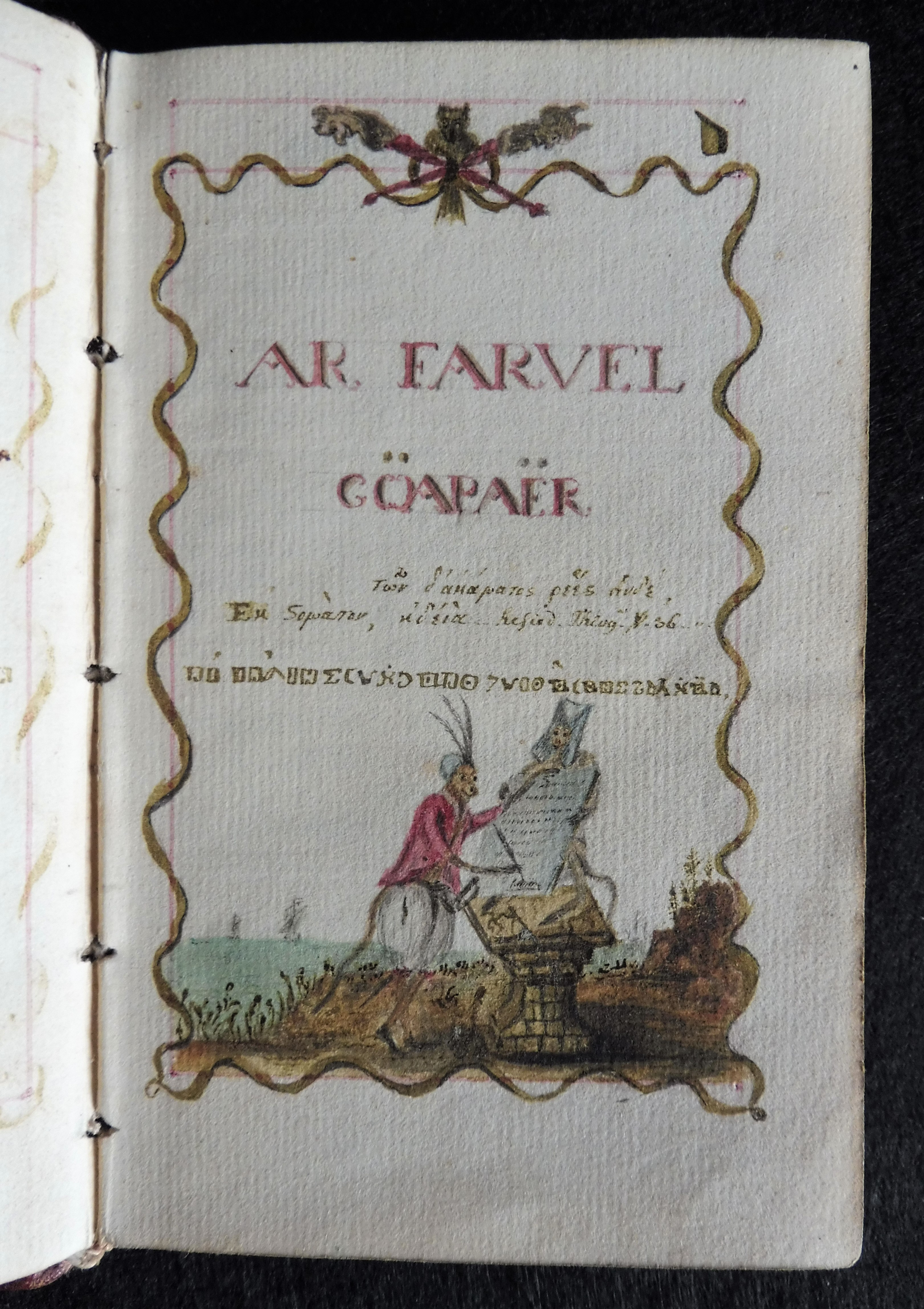 Manuscrit autographe, collection particulière. Cliché Estelle Boudillet, 2017.